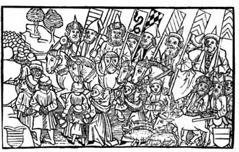 Sigismunds Ordensritter - zeitgenössische Malerei